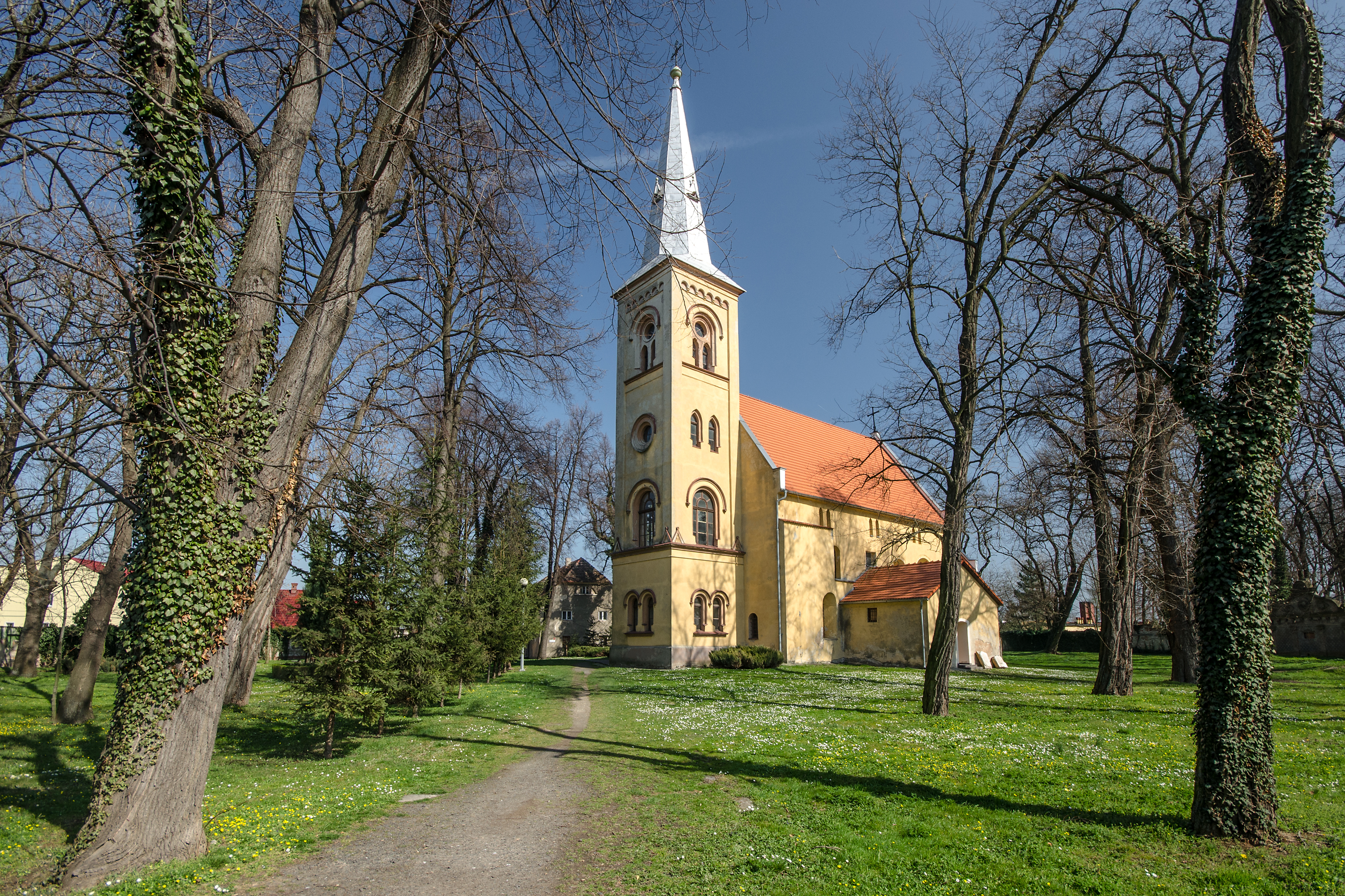 Wądroże Wielkie, zespół kościoła par. p.w. Matki Boskiej Różańcowej, 2 ćw. XIII, XIX